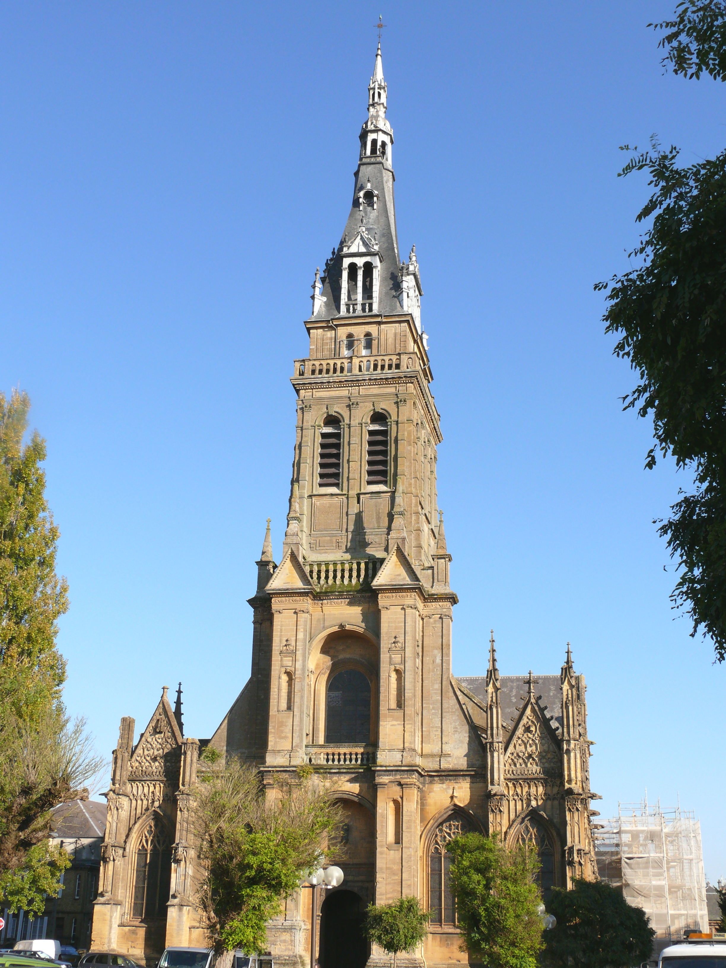 Charleville-Mézières - Basilique Notre-Dame d'Espérance